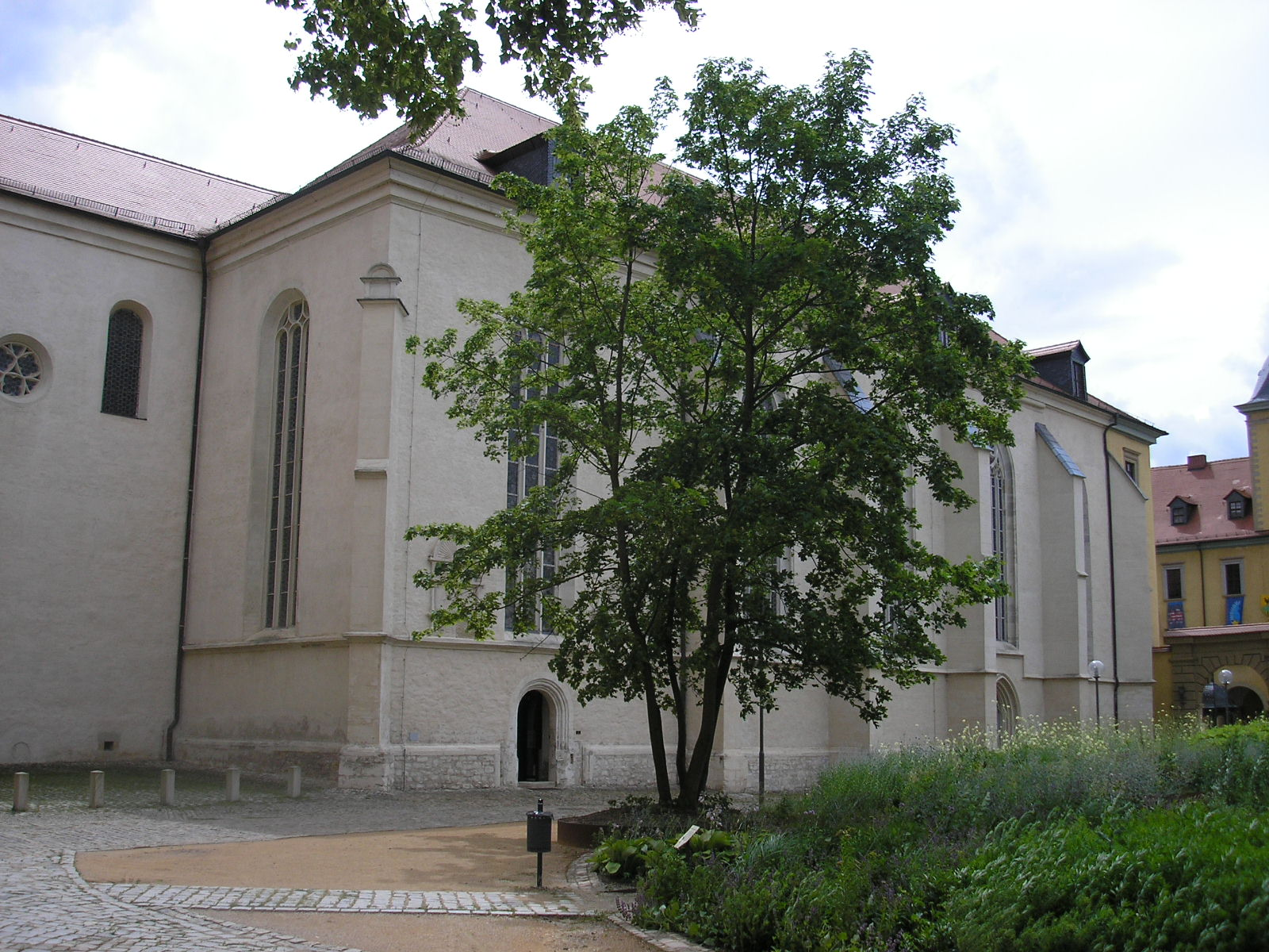 Der Zeitzer Dom.